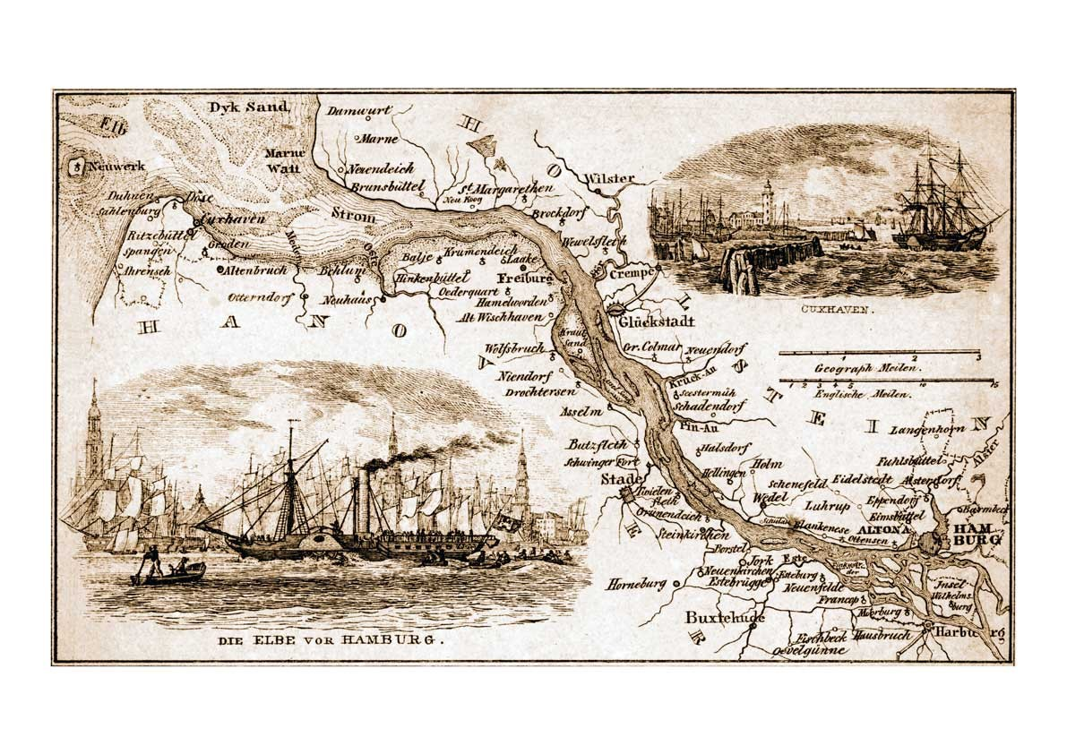 Niederelbe 1857 oder früher.